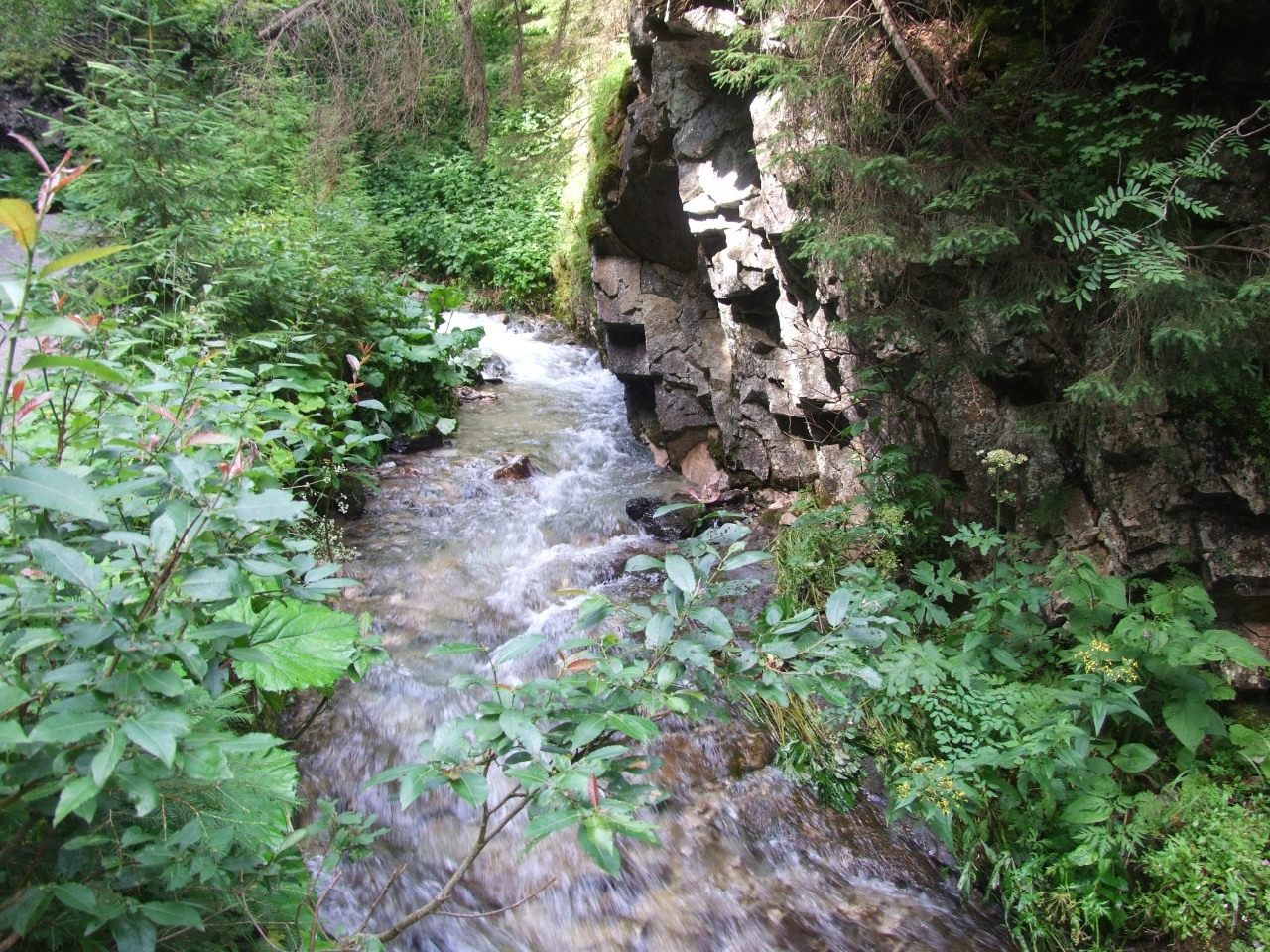 Bobrowiecki Potok w wąwozie Skálna brána